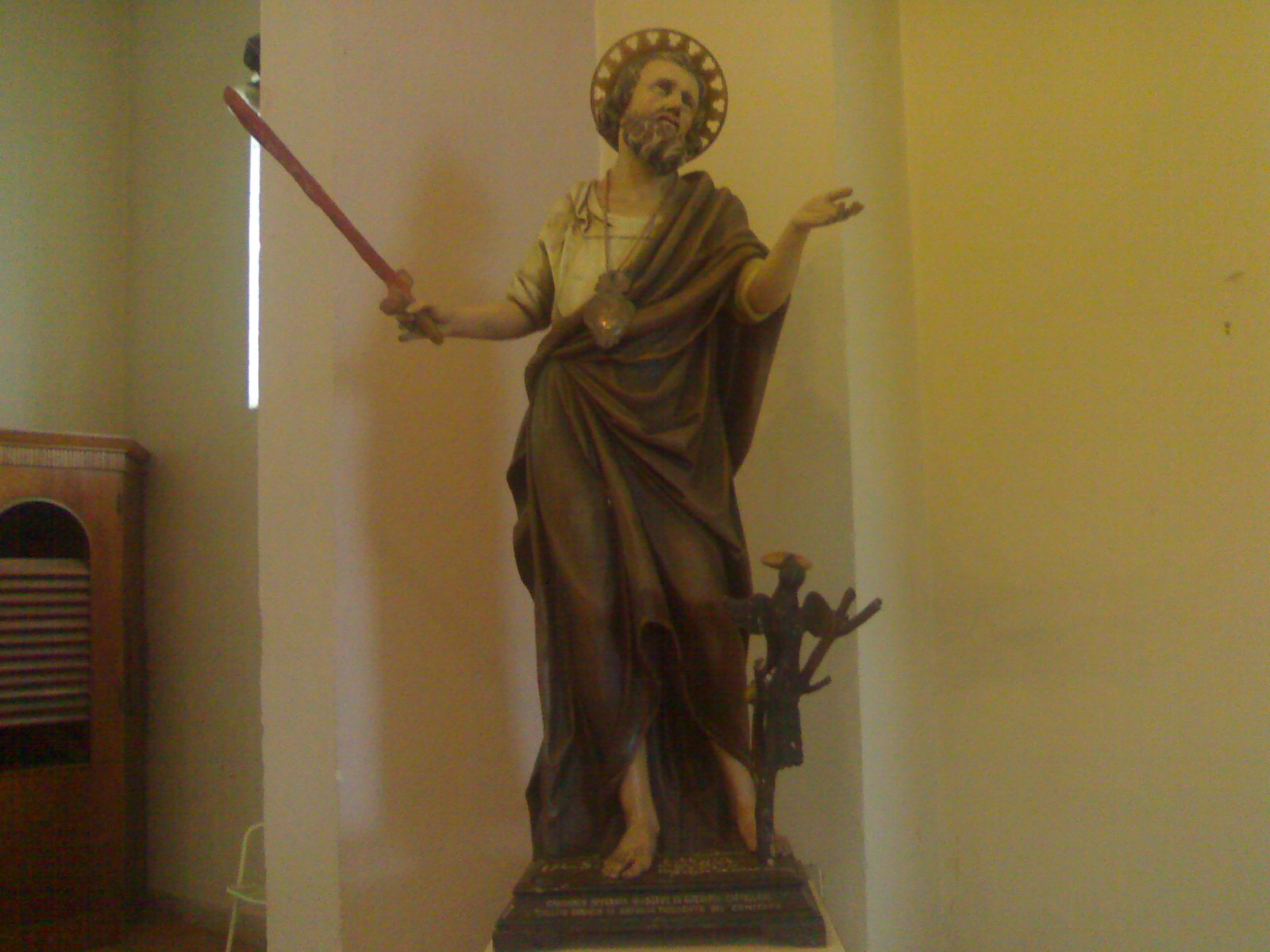 Statua di Sant'Elia venerata nell'omonimo monte di Palmi